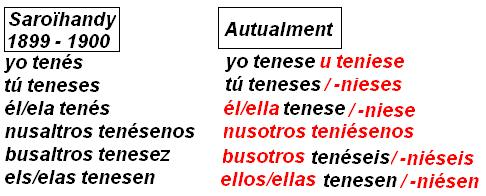 Formas d'o preterito imperfeuto de subchuntibo, d'o berbo "Tener" en a balle de Bio. Endicazions de Saroïhandy d'os años 1899 - 1900, comparadas con as formas autuals.